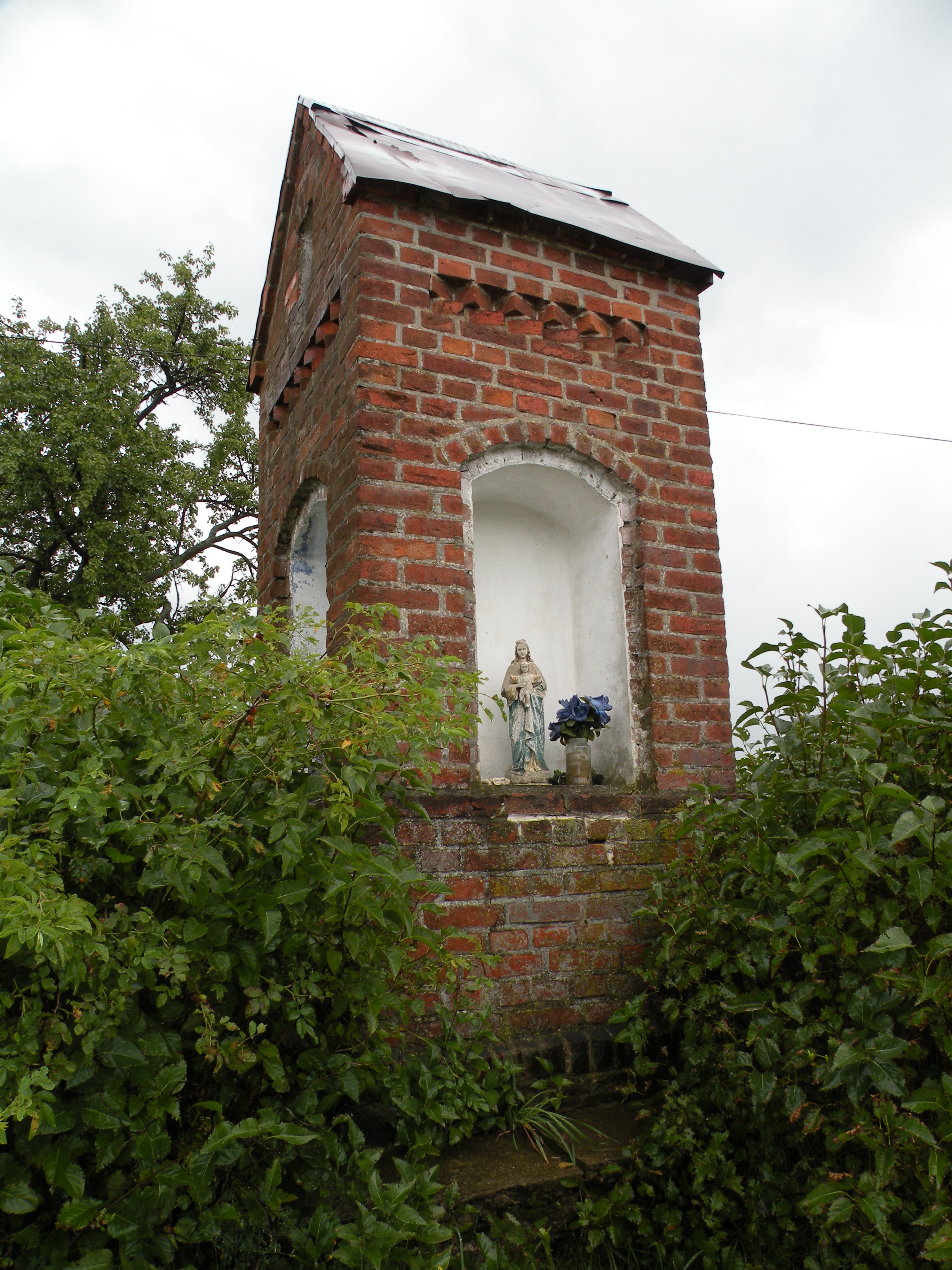 Kapliczka przy wjeżdzie do wsi, Dąbrówka Wielka